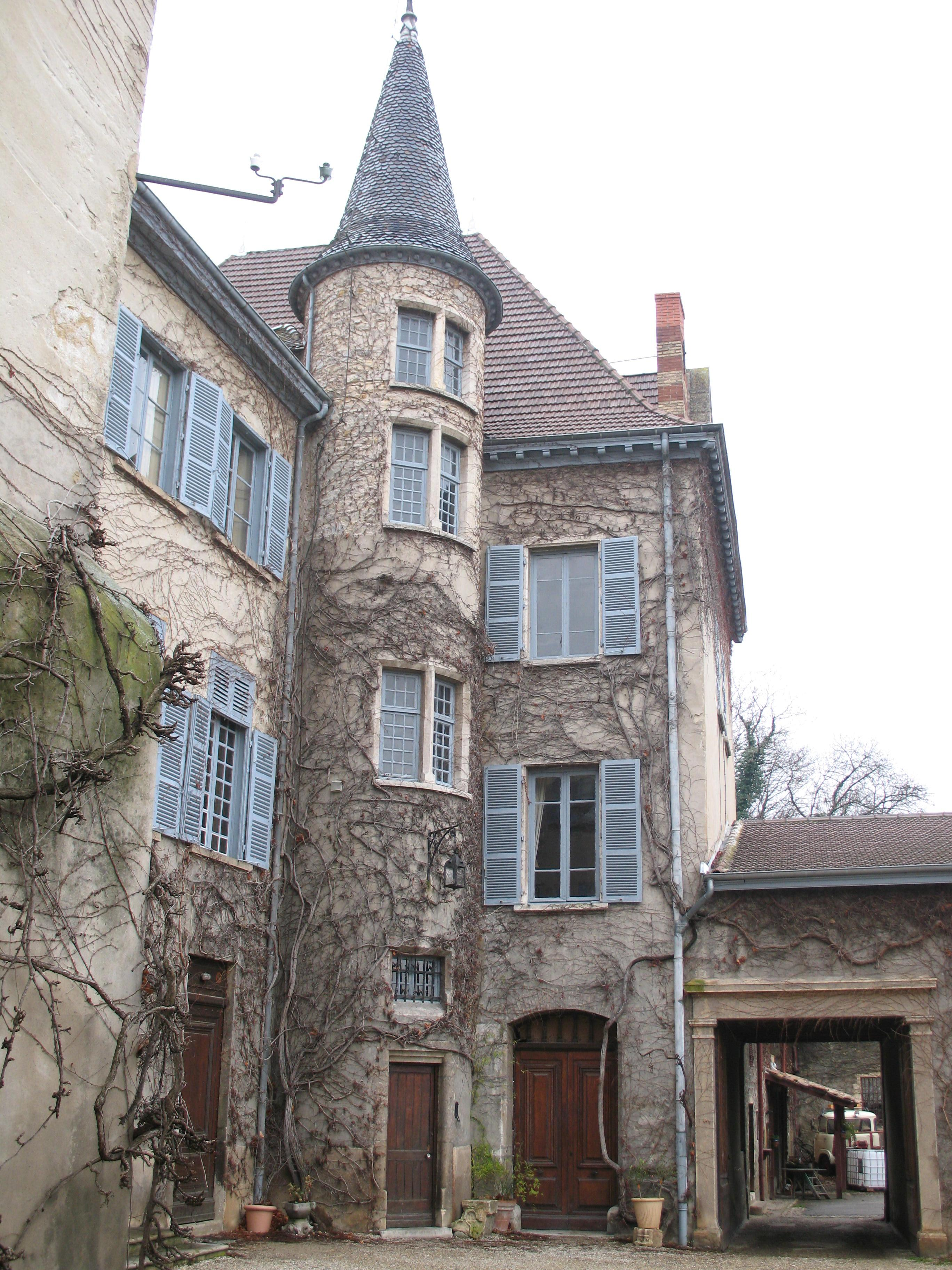 Château de la Combe à Irigny dans le Rhône (côté cour)